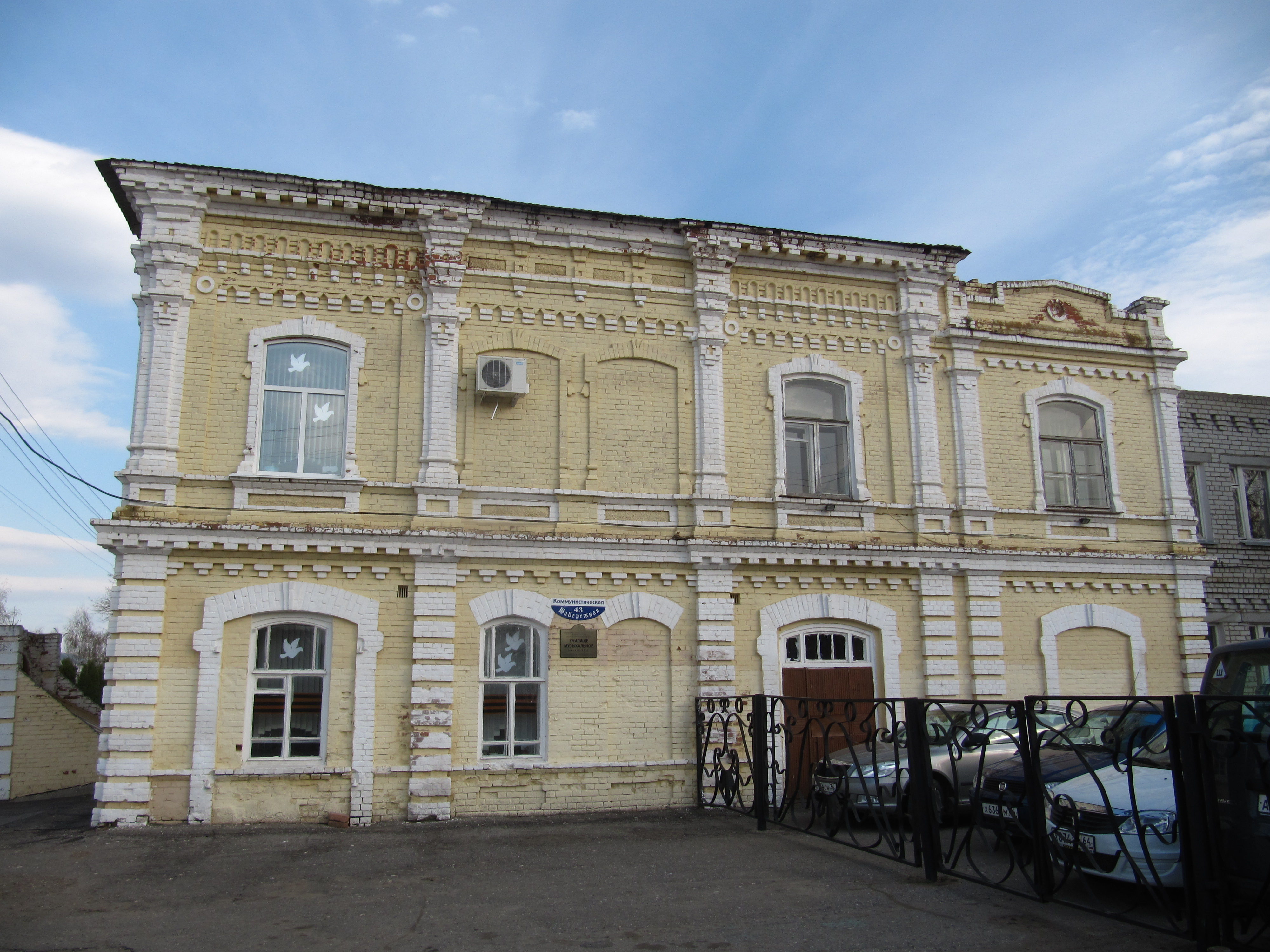 Старое музыкальное училище, Маркс. Архитектурный памятник регионального значения